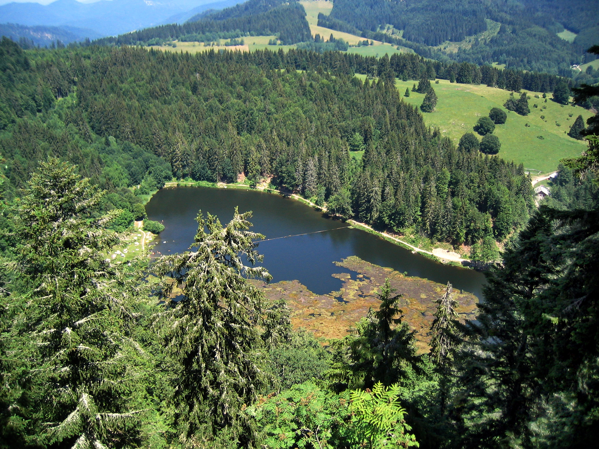 Nonnenmattweiher